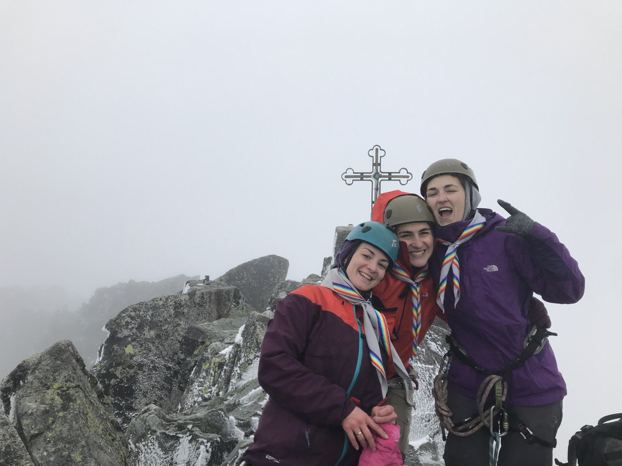 Три засновниці Бунтарок на Герлаховському Щиті, 3 листопада 2019.